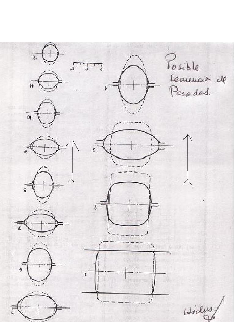 pasadas de laminacion, tipicas